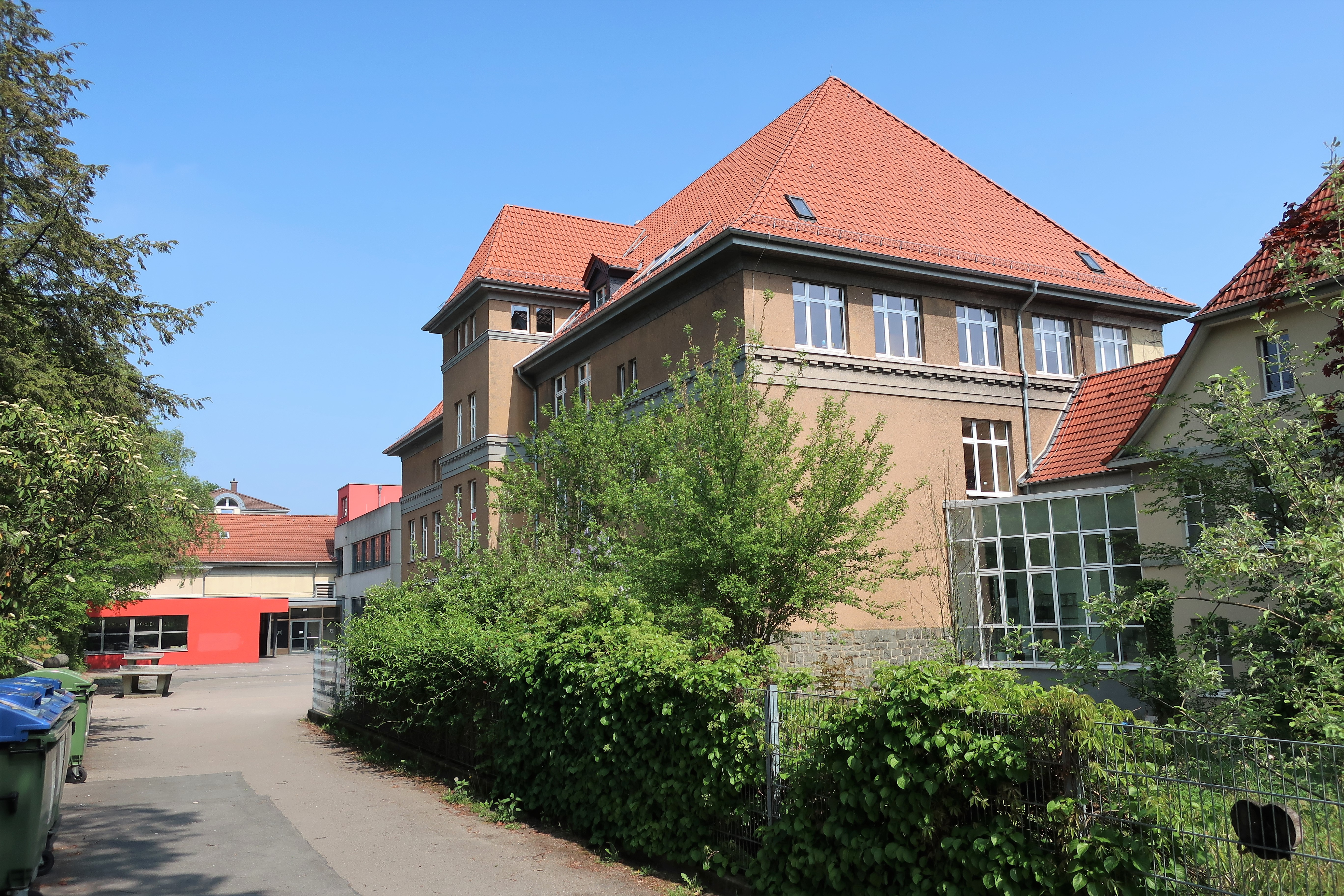 Albrecht-Dürer-Gymnasium in Hagen, Heinitzstraße 73. Blick von der Leibnitzstraße auf die Westseite und zum Schulhof.